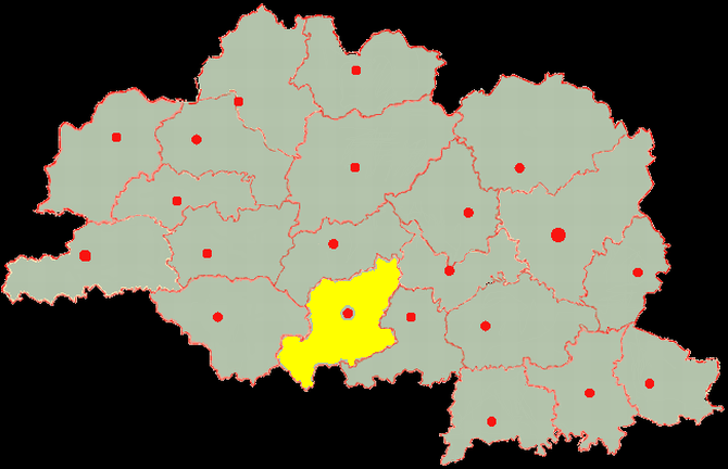 Vitebsk-obl-Lepel region